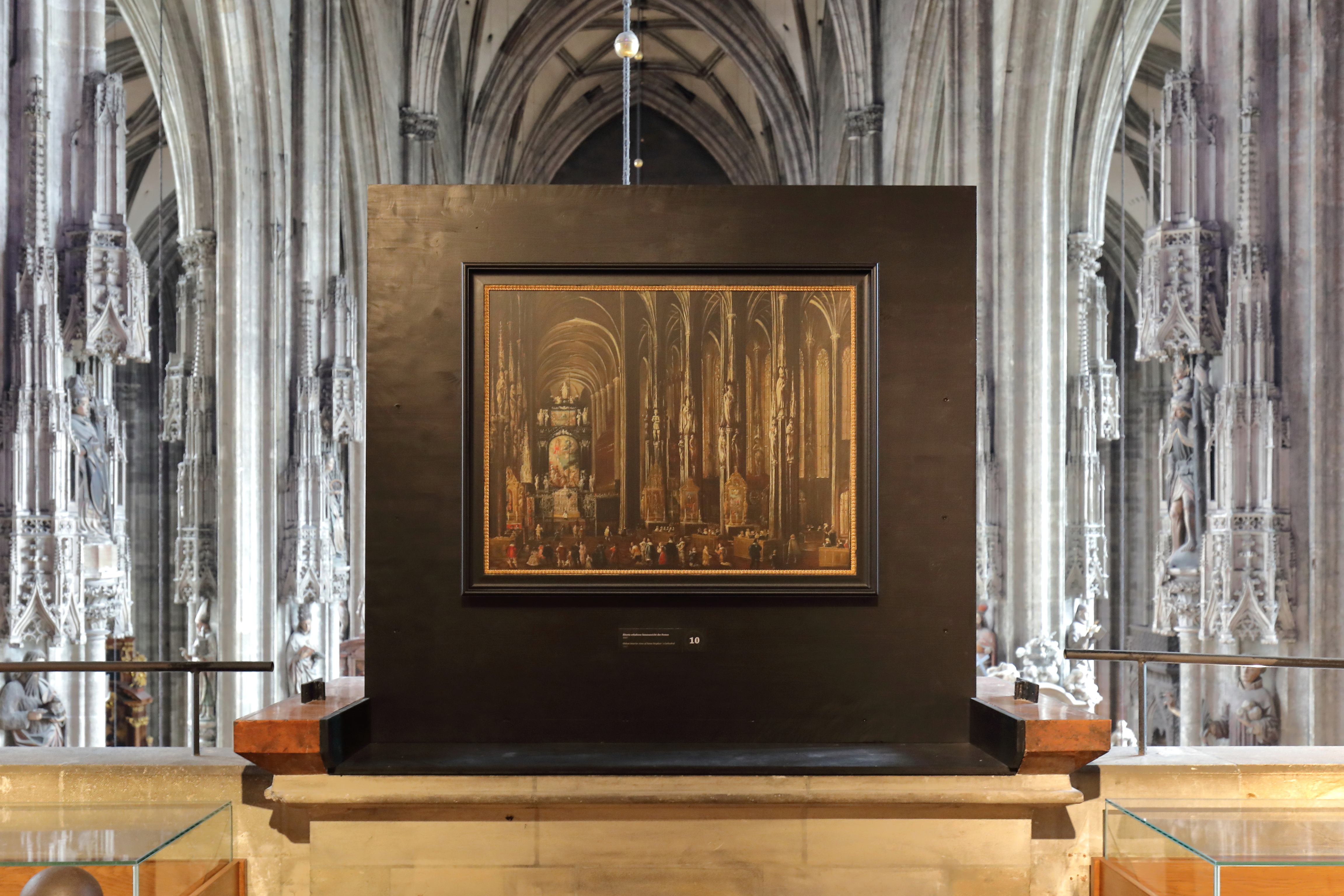 Blick von der Westempore des Stephansdoms in Richtung Hochaltar in der österreichischen Bundeshauptstadt Wien. Im Vordergrund die älteste erhaltene Innenansicht des Domes (1647), ein Exponat der musealen Dauerausstellung: Der Domschatz von St. Stephan.